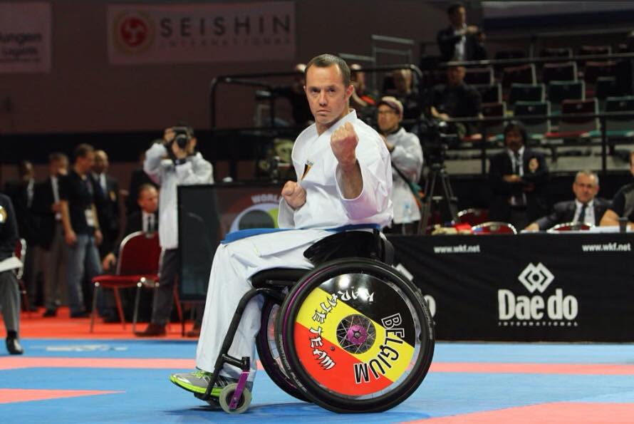 Franck Duboisse, champion du monde WKF exécutant Suparimpei